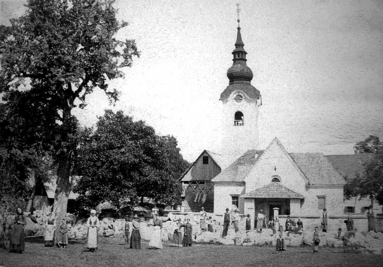 Cerkev sv. Vida na Brezjah.